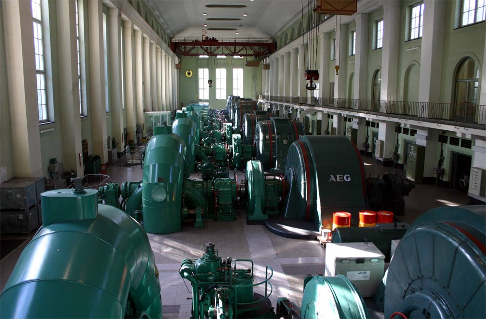 Die Turbinenhalle des Kraftwerks Walchensee Fotografiert von Softeis